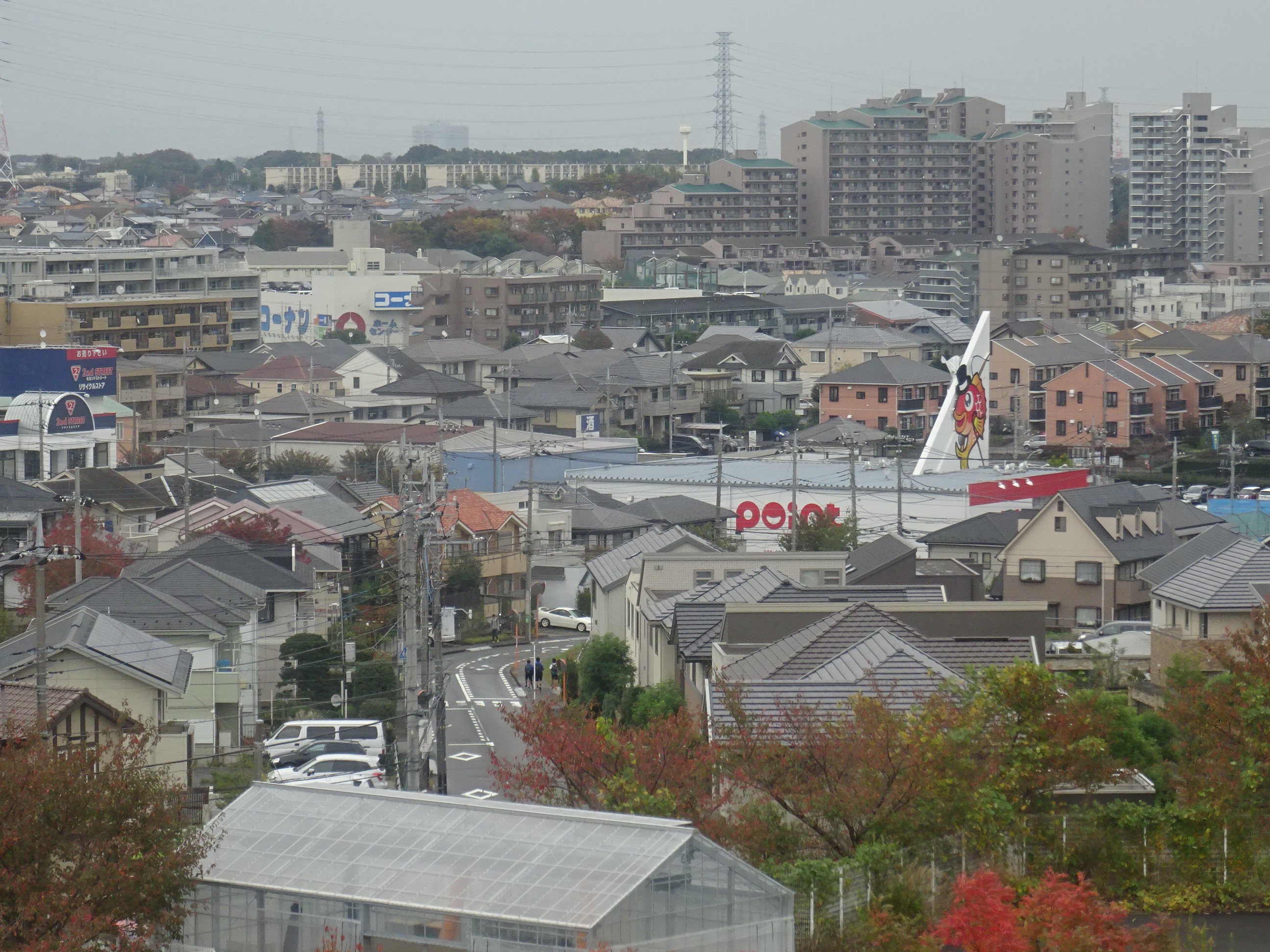 都筑区牛久保における港北ニュータウンの街並み（2015/11/10撮影）